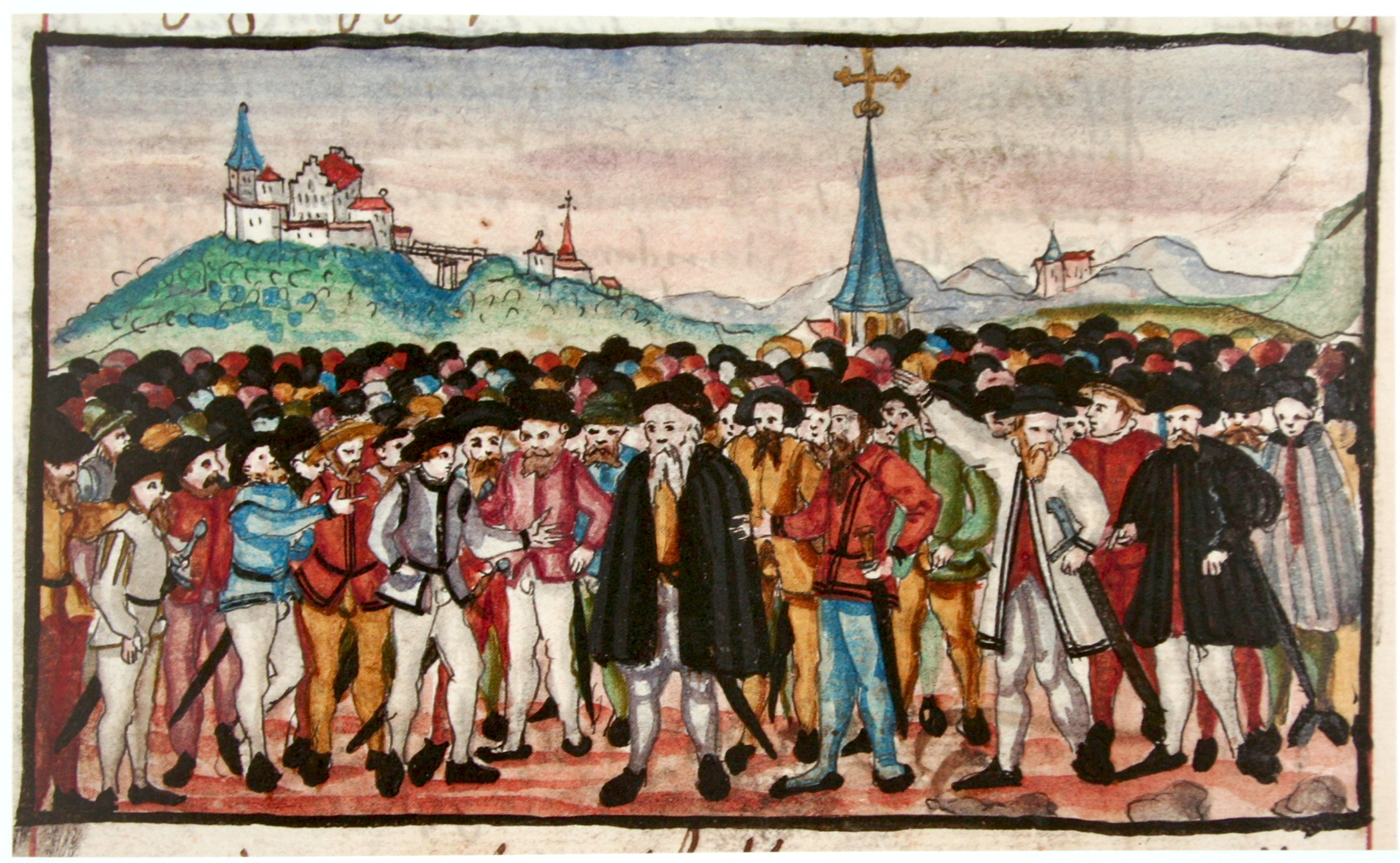 Kloster Töss Bauernsturm Töss im Juni 1625; Abschrift der Reformationschronik Bullingers